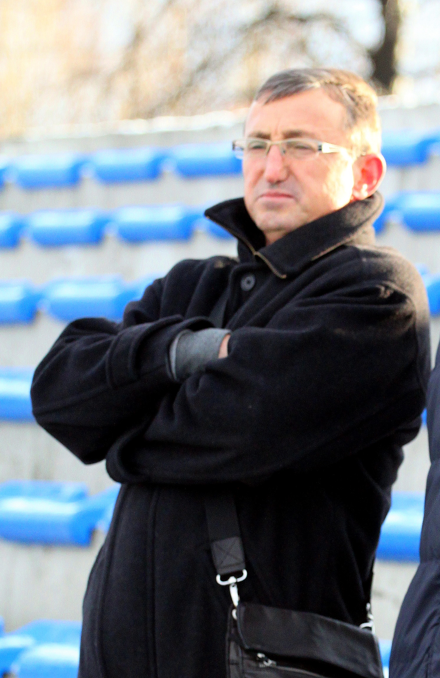 Марин Бакалов - бивш български футболист, треньор.